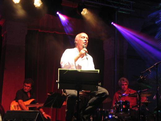 El cantautor catalán Joan Isaac en concierto en Barcelona